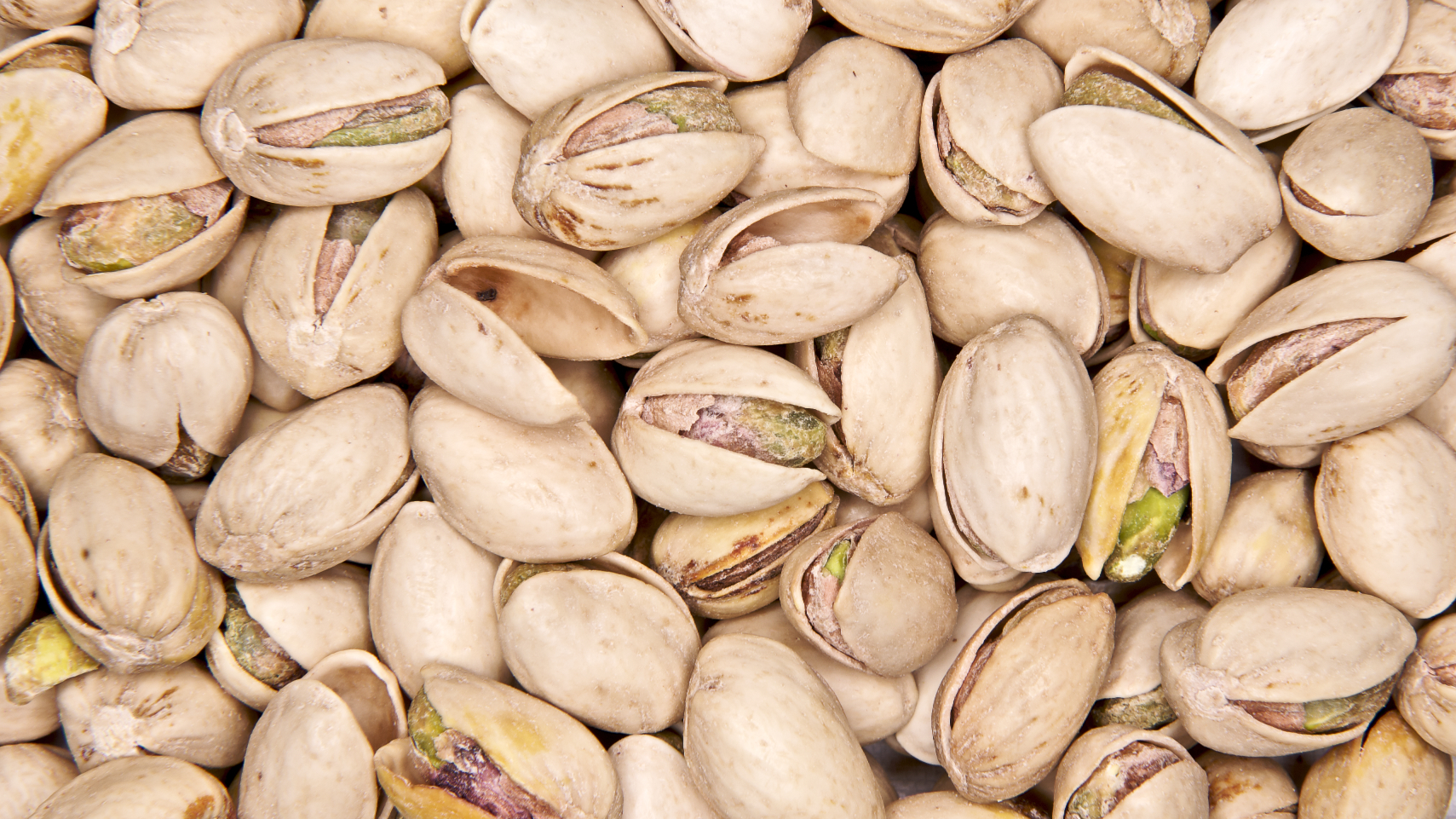 Pistachio